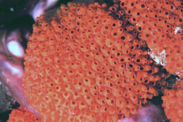 群体ボヤの一種 （マボヤ目 シロボヤ科 Symplegma rubra コバンイタボヤの近縁種） Public domain image published by National Oceanic and Atmospheric Adminstration (NOAA), USA Image ID: sanc0518"Sanctuary Collection"Location: Gray's Reef National Marine SanctuaryPhoto: Dean De Philipo (Passage Productions)（米国東海岸、グレイ岩礁 国立海洋保護区にて撮影） from